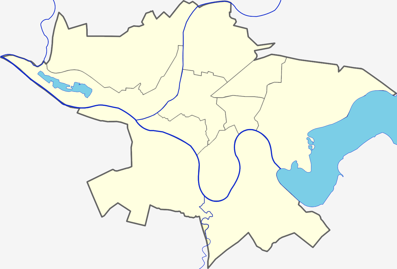 Kauno miesto žemėlapis.